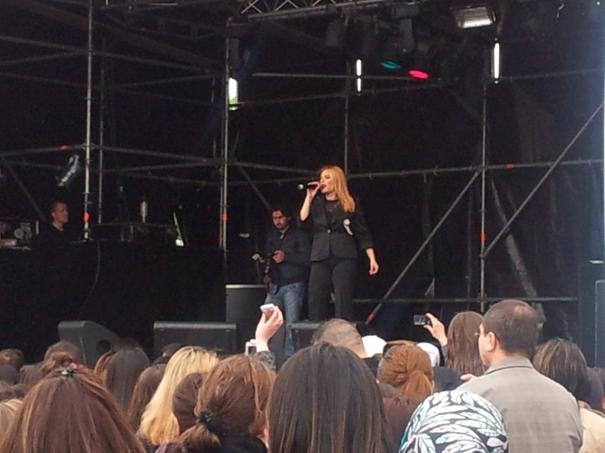 Reyhan Karaca 2012 Brüksel Kültür Günler Açık Hava Konseri, 19 Mayıs.